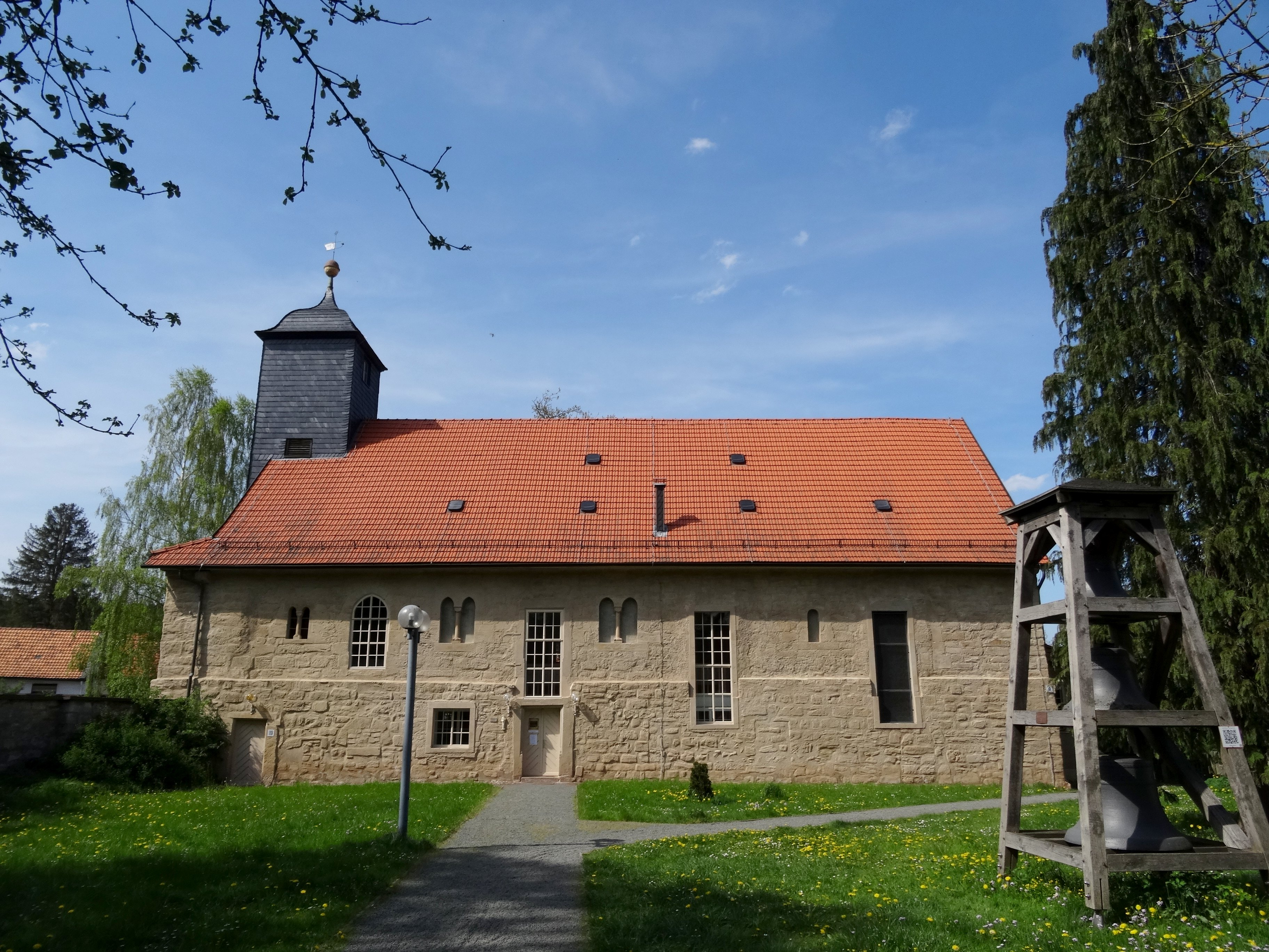 Georgenthal/Thüringen, Kirche St. Elisabeth